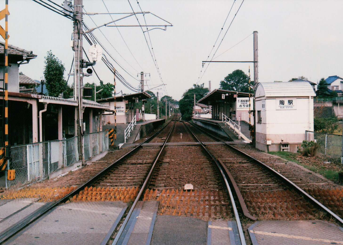 陶駅構内(2011/10/08)